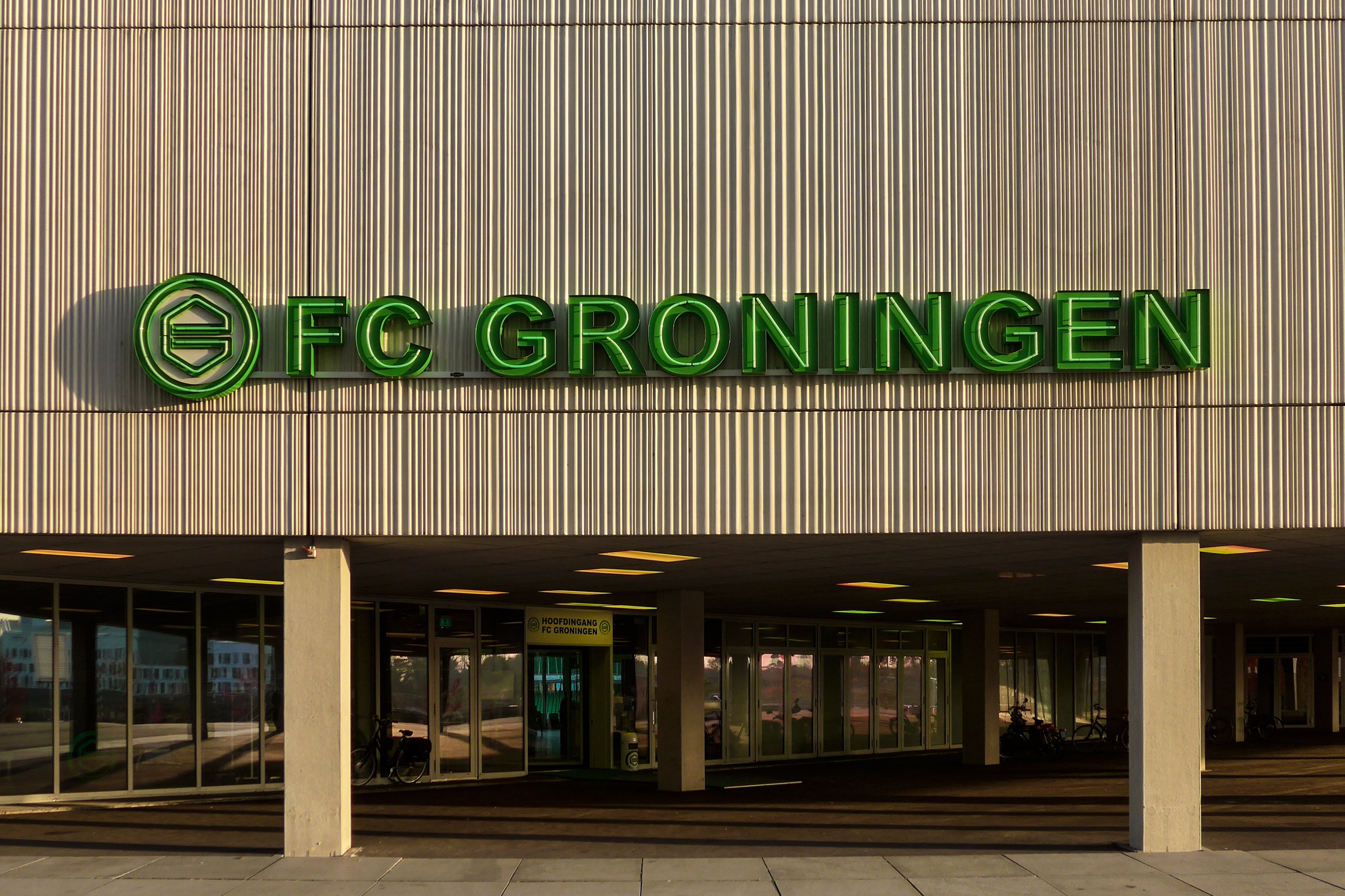 De haadyngong fan de Euroborg, it stadion fan FC Groningen yn Grins.